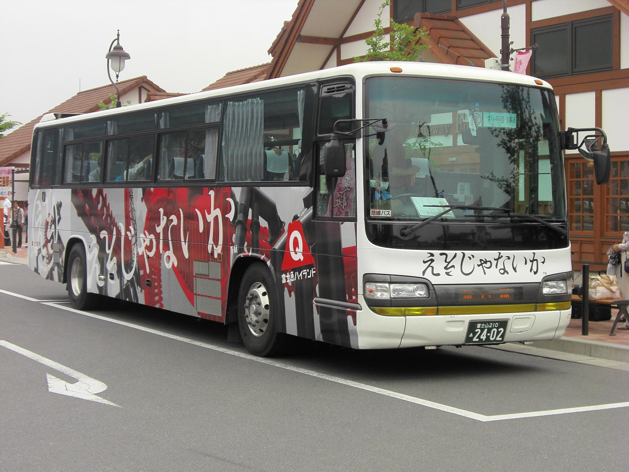 「ええじゃないか」のラッピングバス